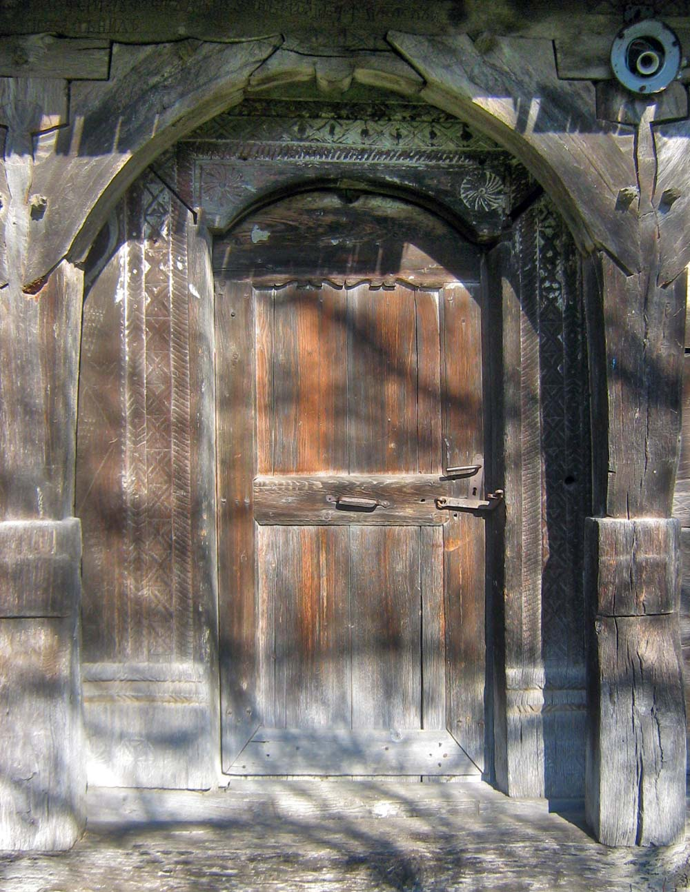 Biserica de lemn din Brebi, Sălaj. Intrarea.